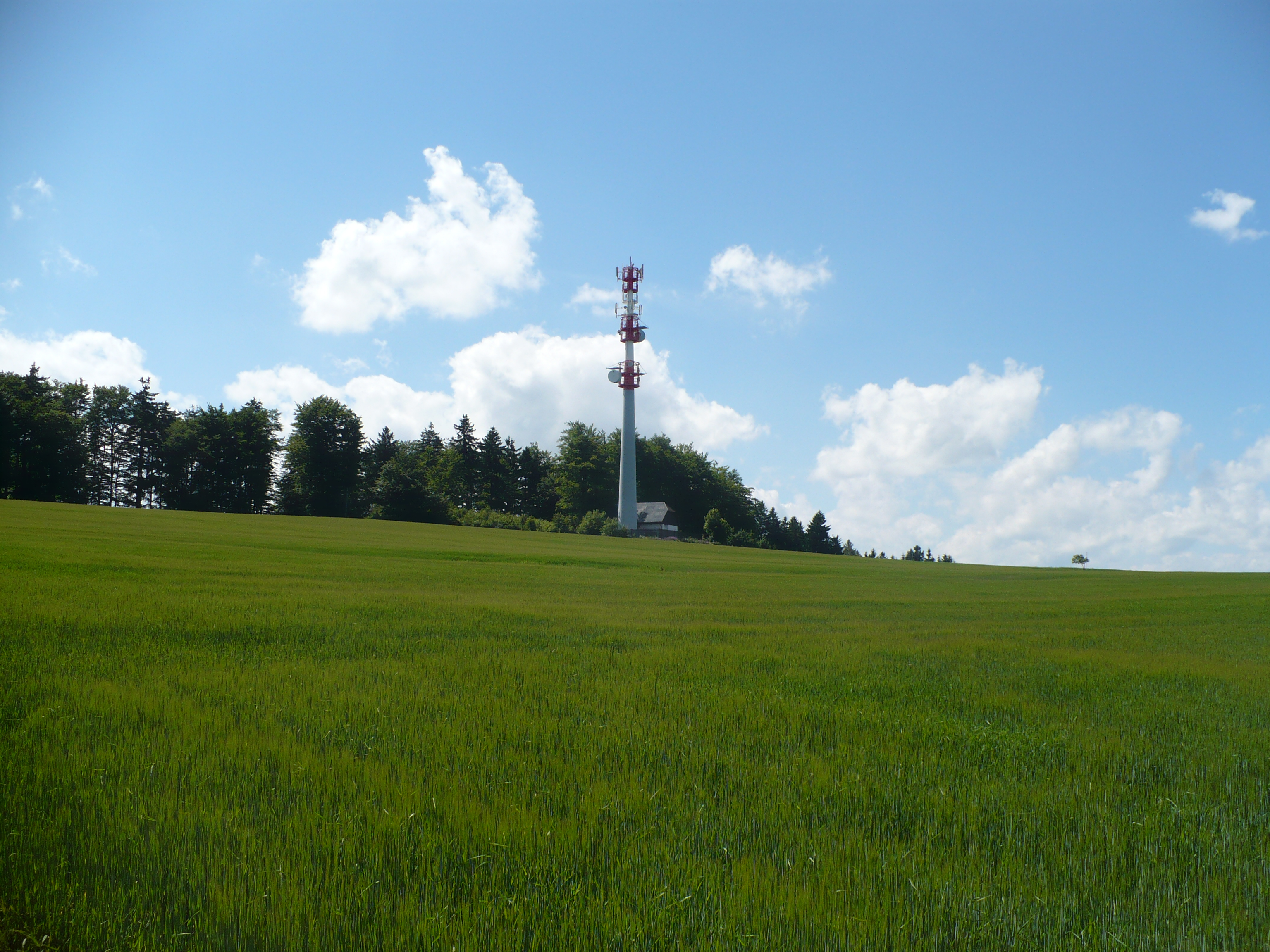 Havlina od východu